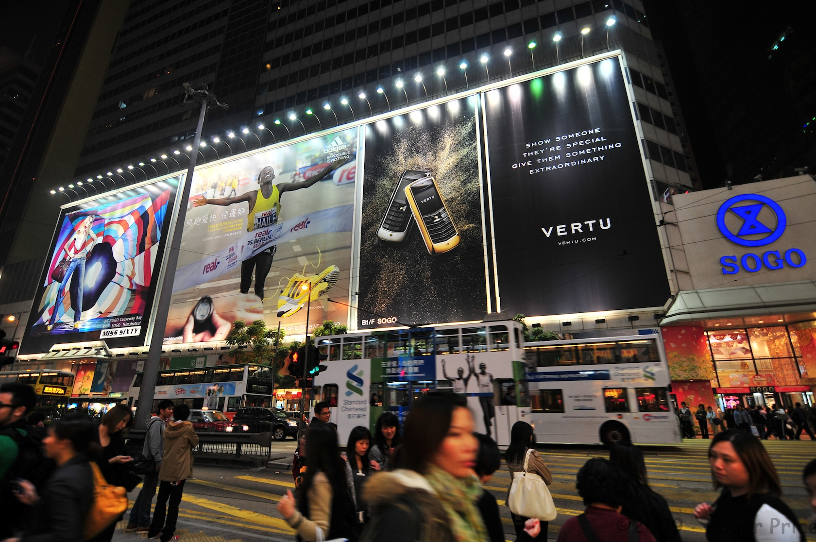 香港崇光百貨 Sogo CWB